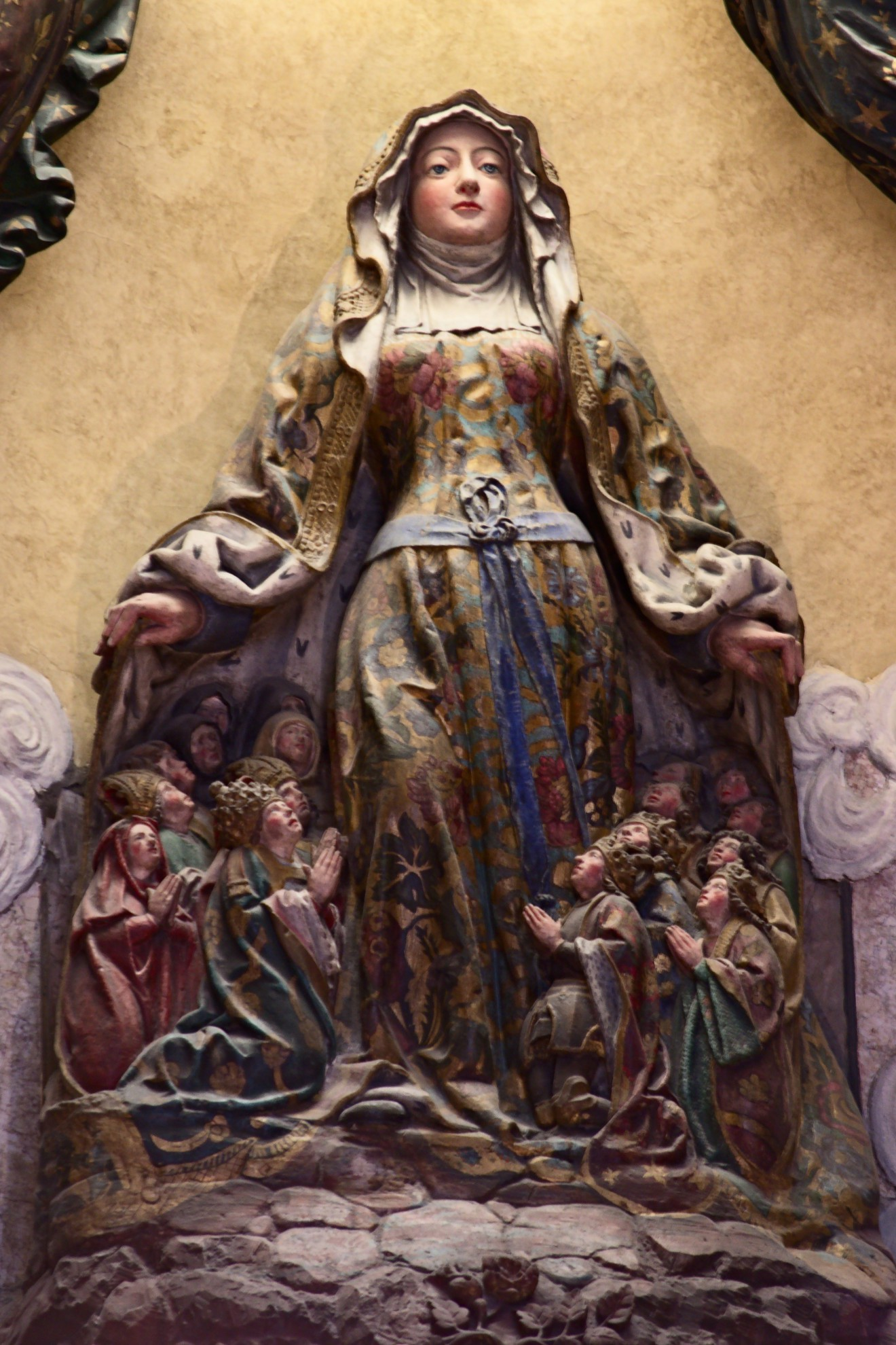 France, Lorraine, Meurthe-et-Moselle, Nancy : église baroque de Bonsecours par Emmanuel Héré, statue de Notre Dame de Bonsecours sculptée en 1505 par Mansuy Gauvin